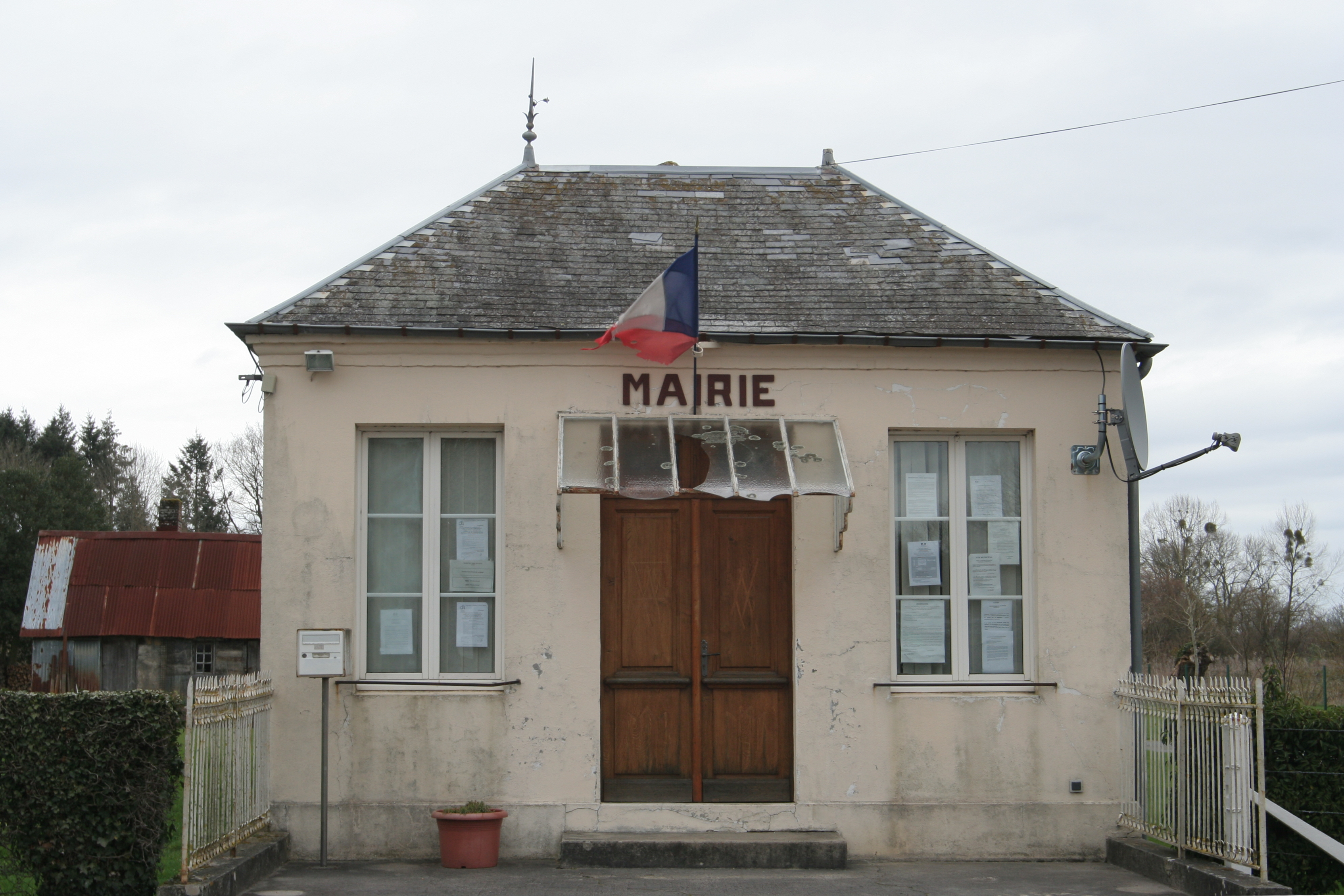 Mairie du Theil-en-Auge.